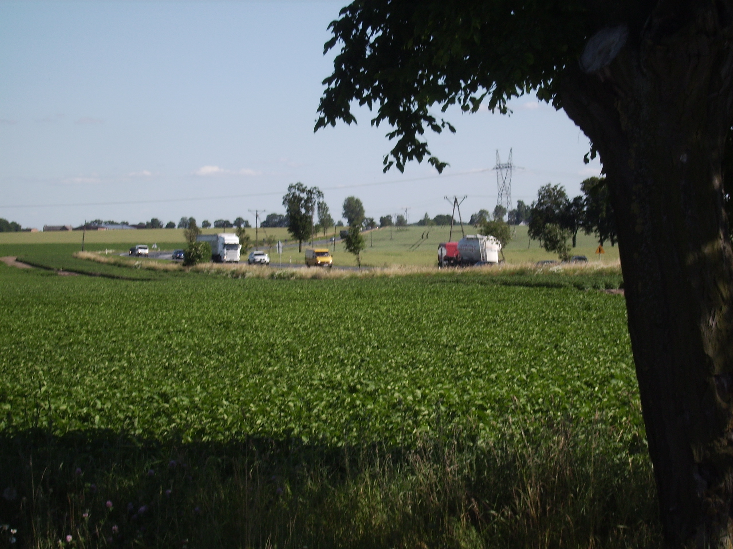 Droga E75 Toruń-Chełmno